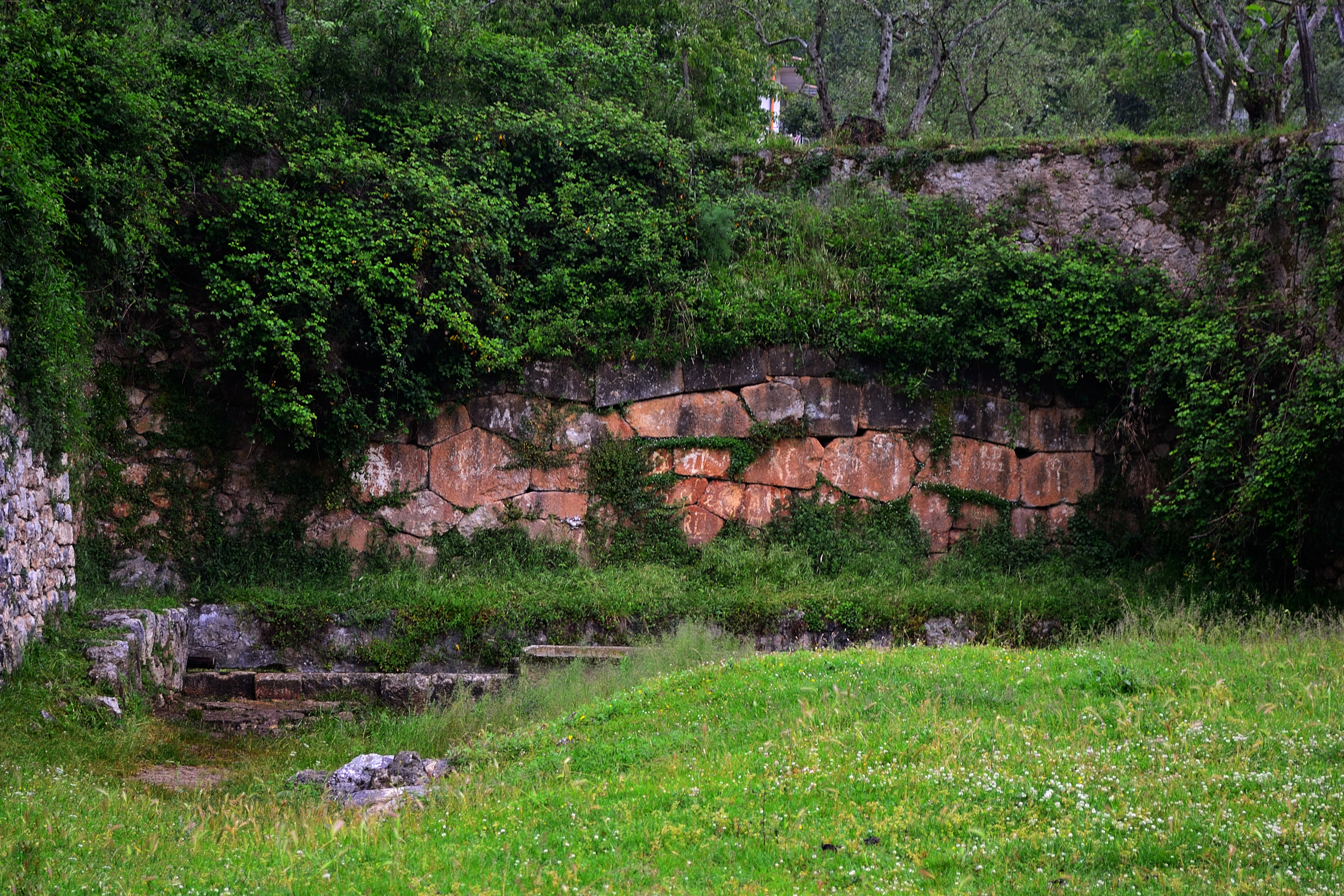 Mura poligonali della fonte di San Fedele